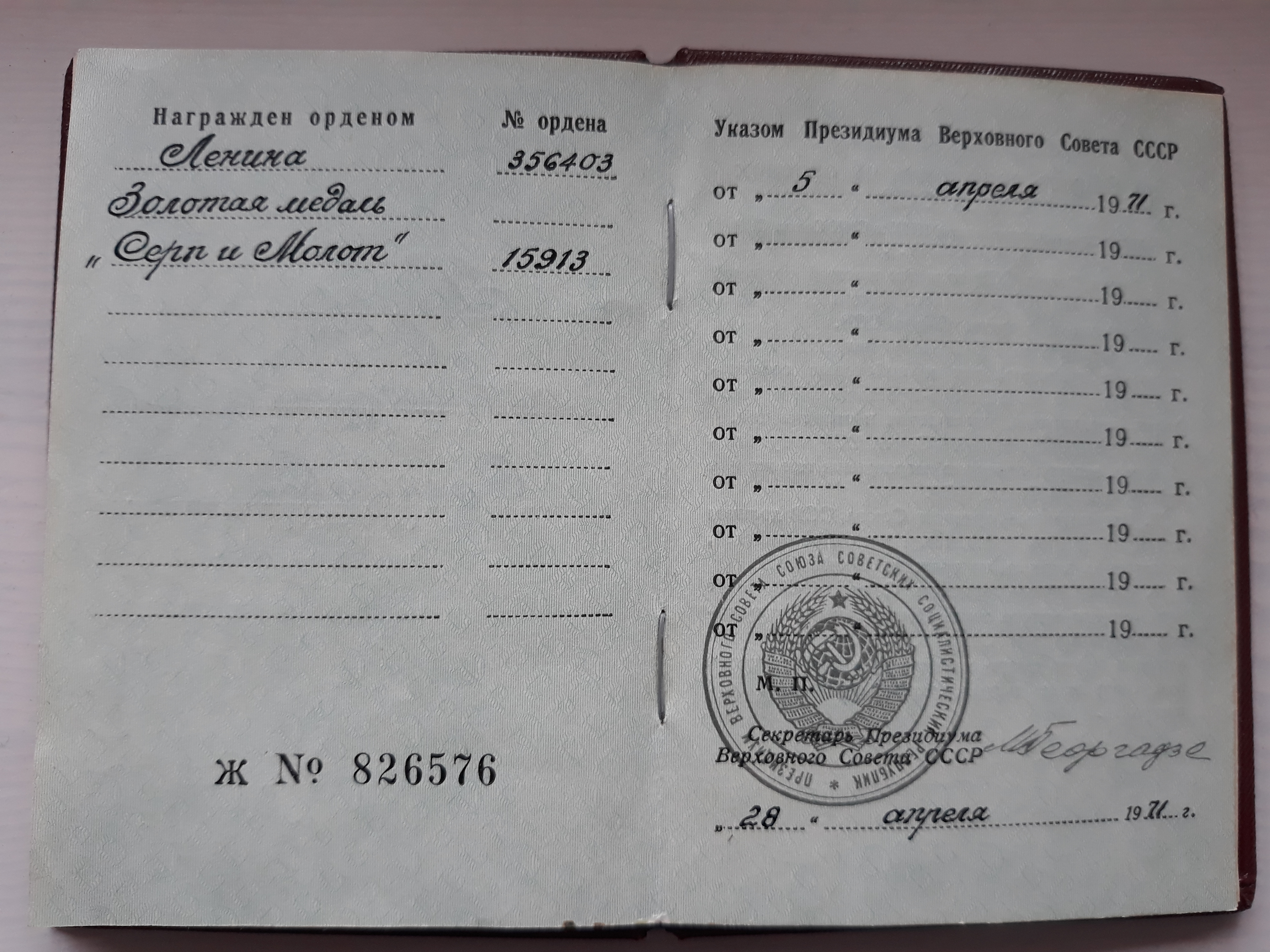 Запись из орденской книжки Керко А.С.